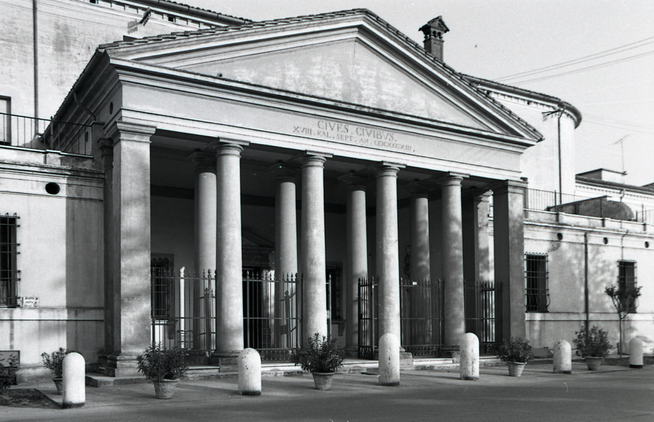 Castel Bolognese, Ospedale degli Infermi, facciata. Servizio fotografico : Faenza, 1968 / Paolo Monti. - Strisce: 4, Fotogrammi complessivi: 20 : Negativo b/n, gelatina bromuro d'argento/ pellicola ; 35 mm. - ((I fotogrammi hanno una doppia numerazione. . - Sul portanegativi: Nikon Adox 17 Agfa 21. - Occasione: Documentazione per pubblicazione: Romagna, Edizioni Alfa. - Fonte: Agenda di Paolo Monti: Monti/ 3 aprile 1966 - 9 marzo 1971/ 12421-16823 (1966-1971), presso Archivio Paolo Monti